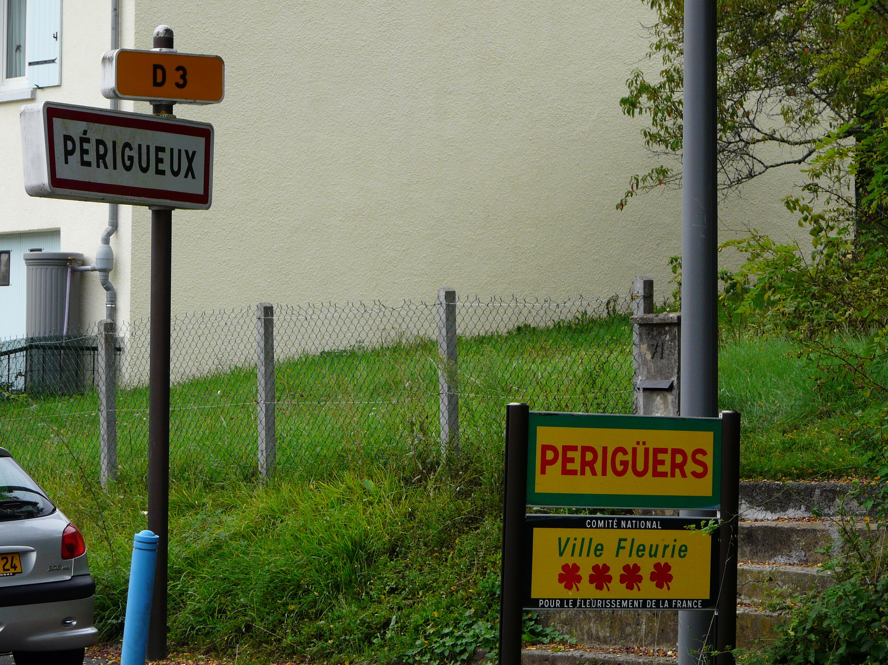 Panneaux d'entrée de ville en français et en occitan, Périgueux, Dordogne, France.